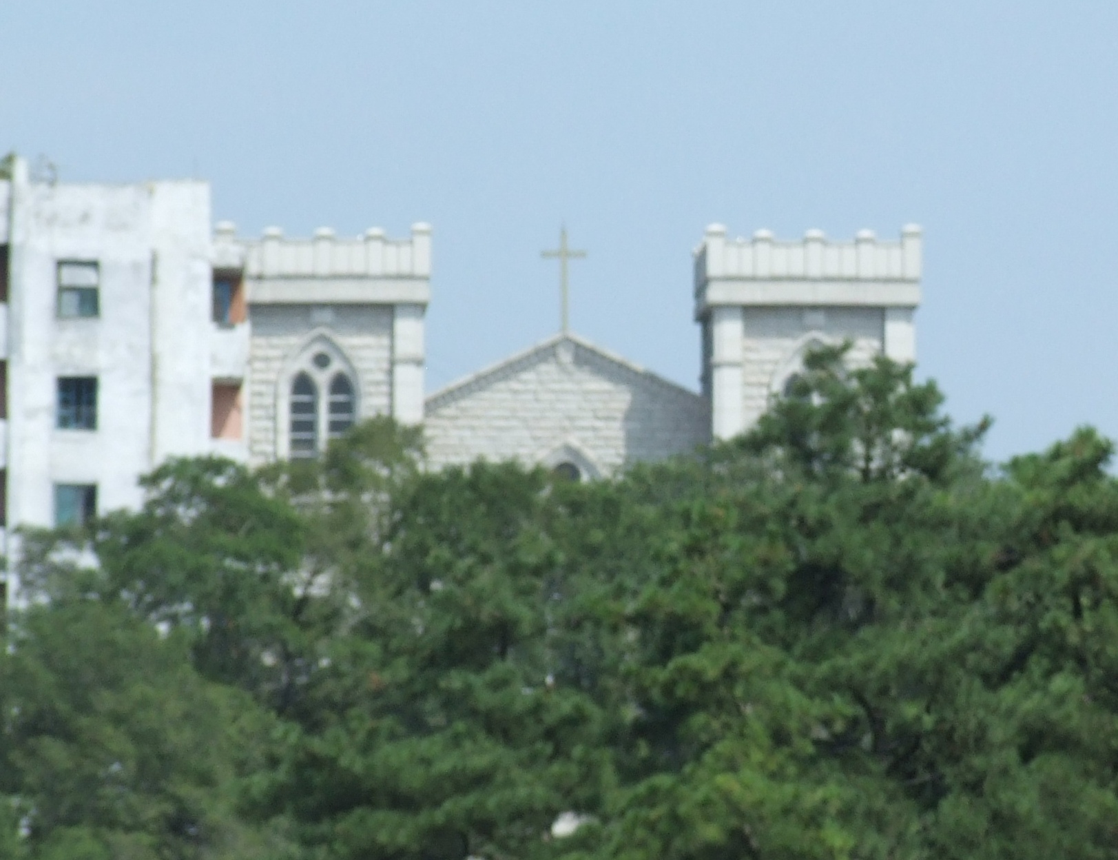 Christliche Kirche in Pjöngjang